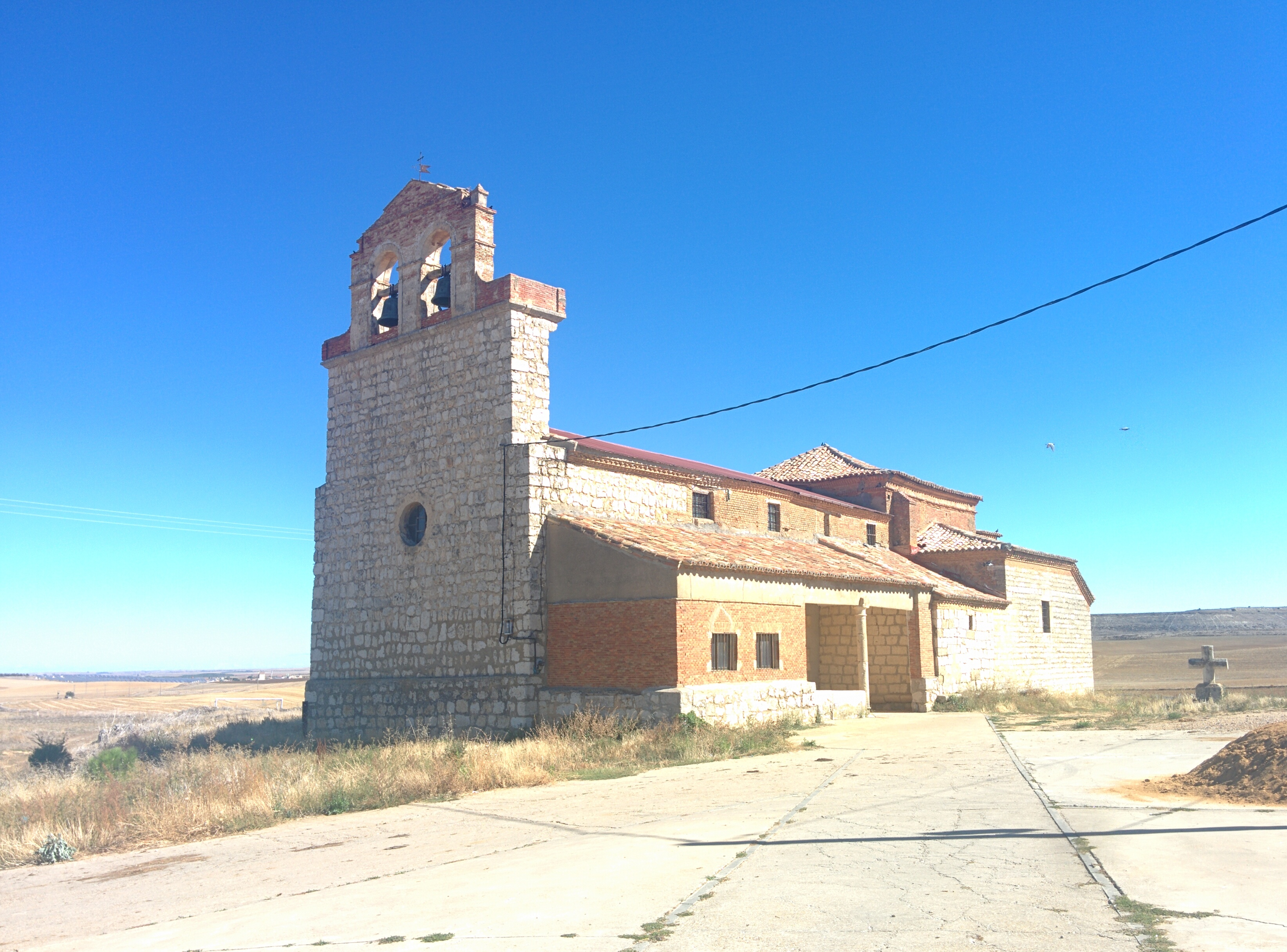 Iglesia de Santa María, en Villavellid (Valladolid, España).